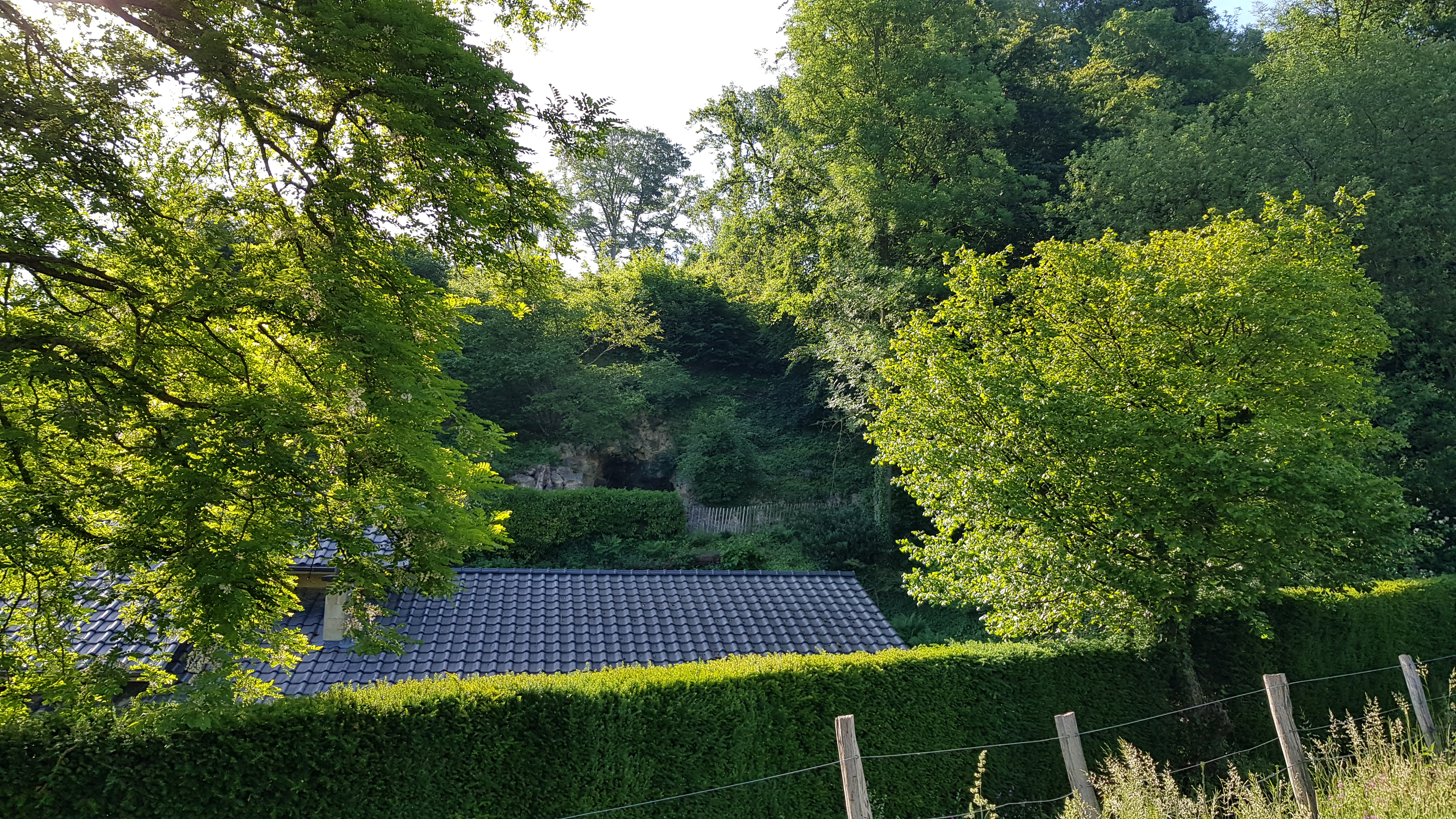 Carolusgroeve, Valkenburg aan de Geul, Nederland